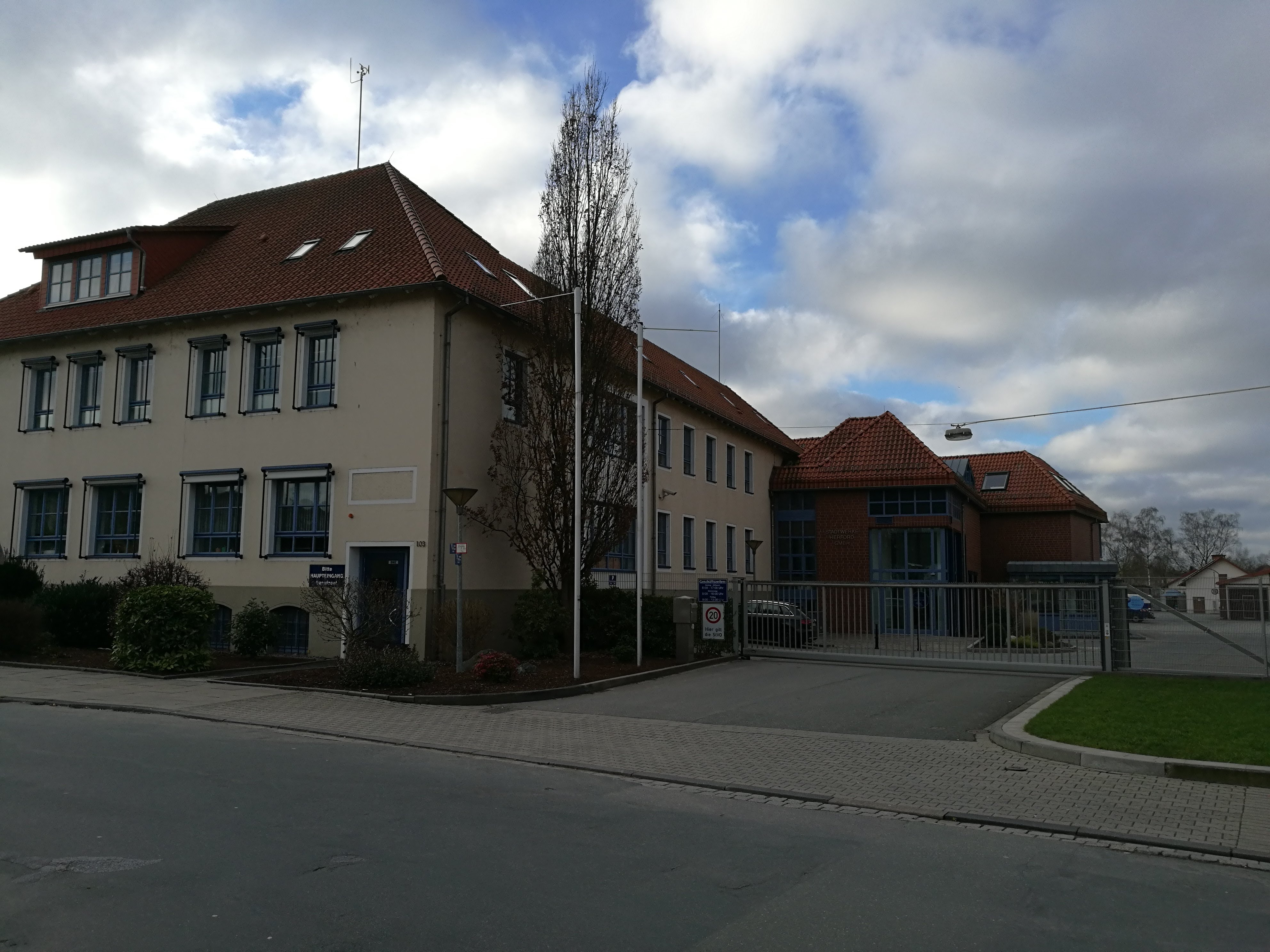 Stadtwerke Herford Hauptverwaltung